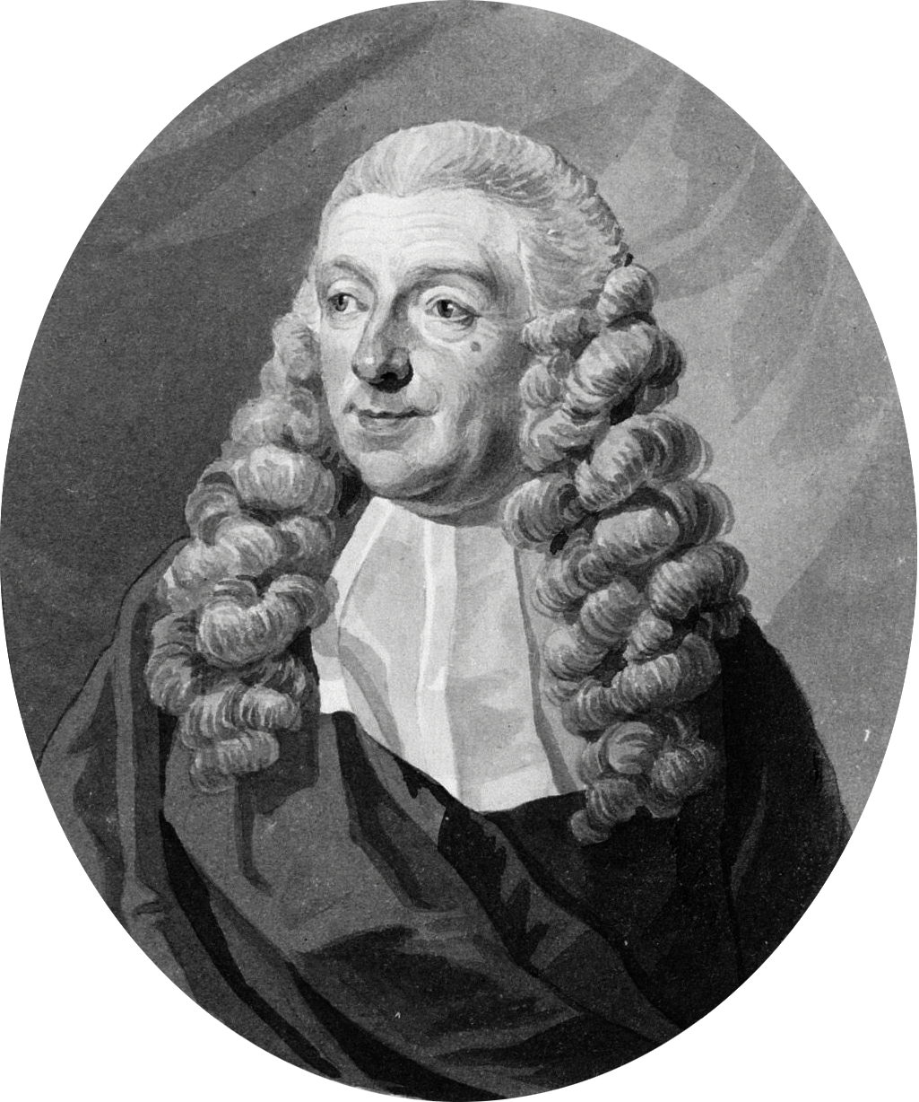 Joachim Rendorp (19-01-1728 / 21-09-1792) Burgermeester en kapitein der Burgerij te Amsterdam.